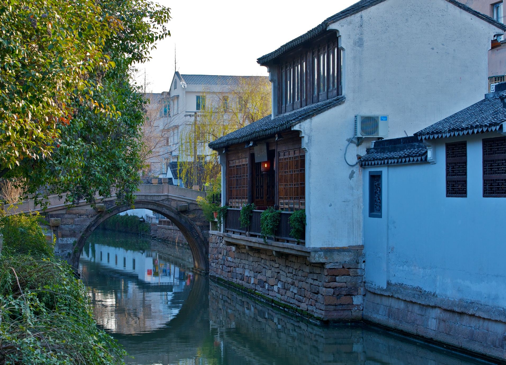 平江路。Pingjiang Road, Suzhou.